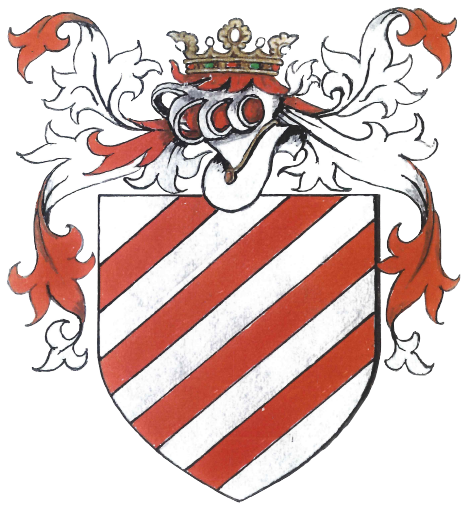 d'argent à quatres barres de gueules casque d'argent couronné